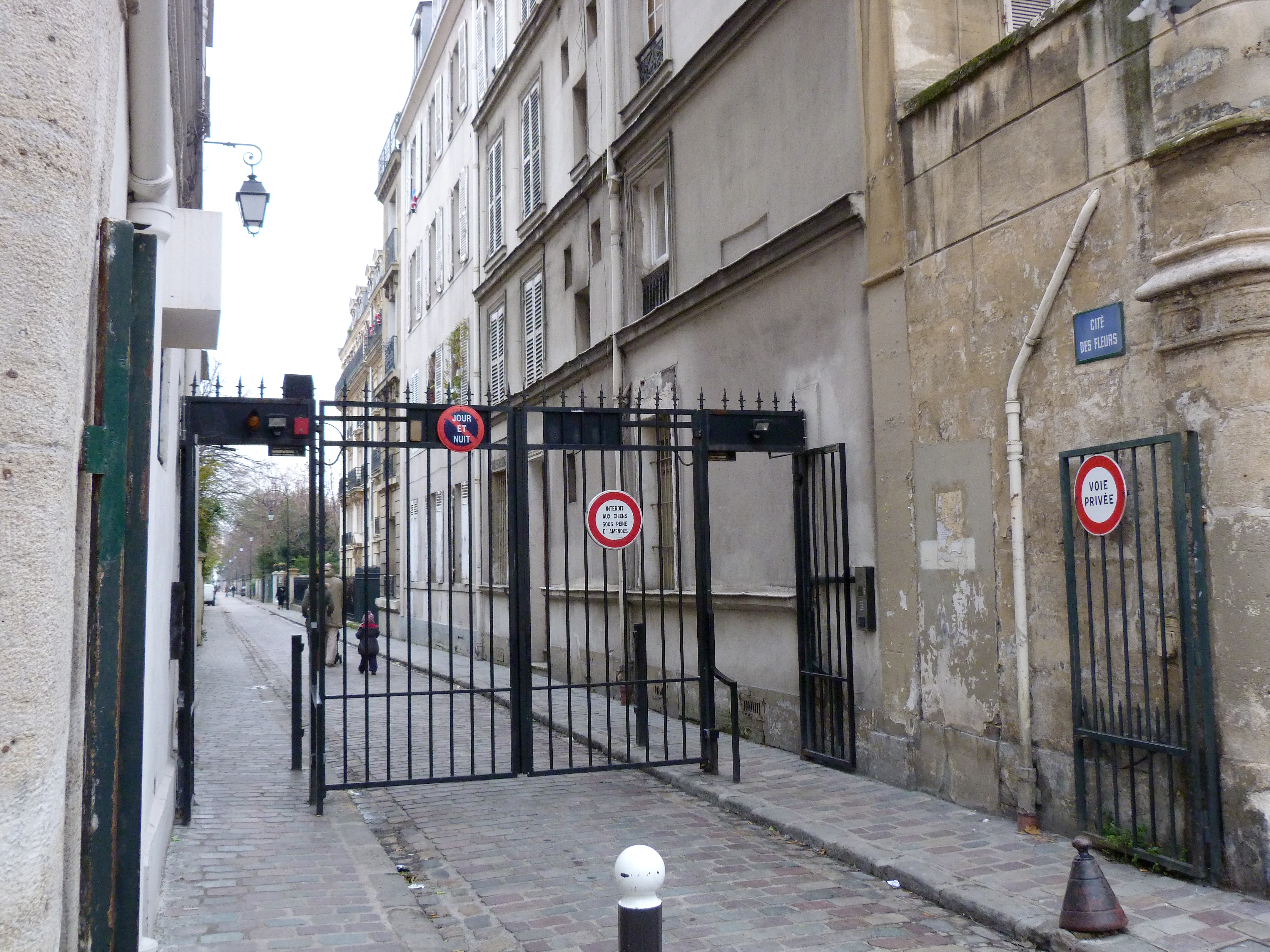 Entrée de la voie privée Cité des Fleurs, extrémité de la rue Guy Môquet au bord l'avenue de Clichy, Paris (17e arrondissement).